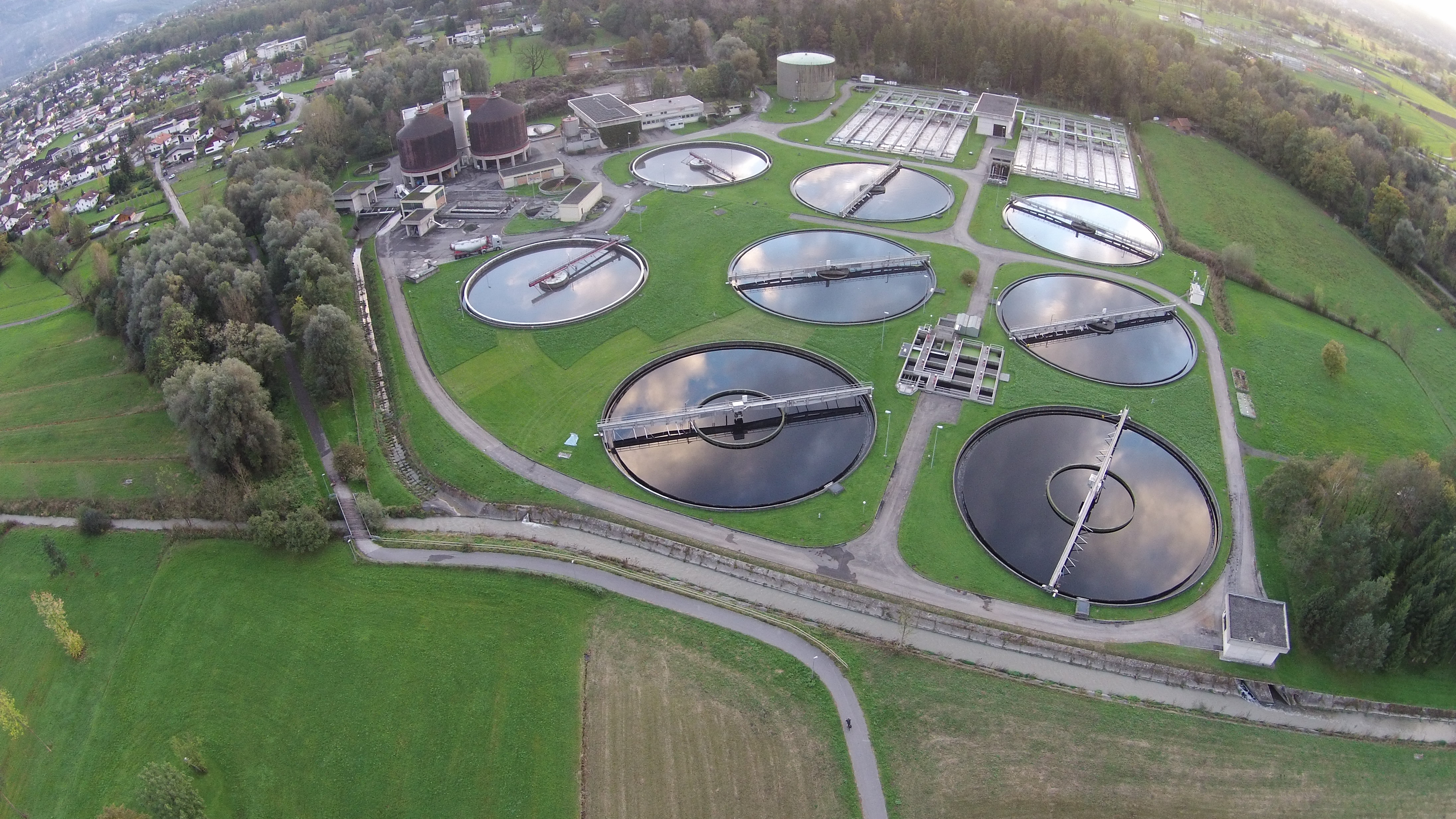 Kläranlage Dornbirn-Schwarzach GmbH - Luftaufnahme